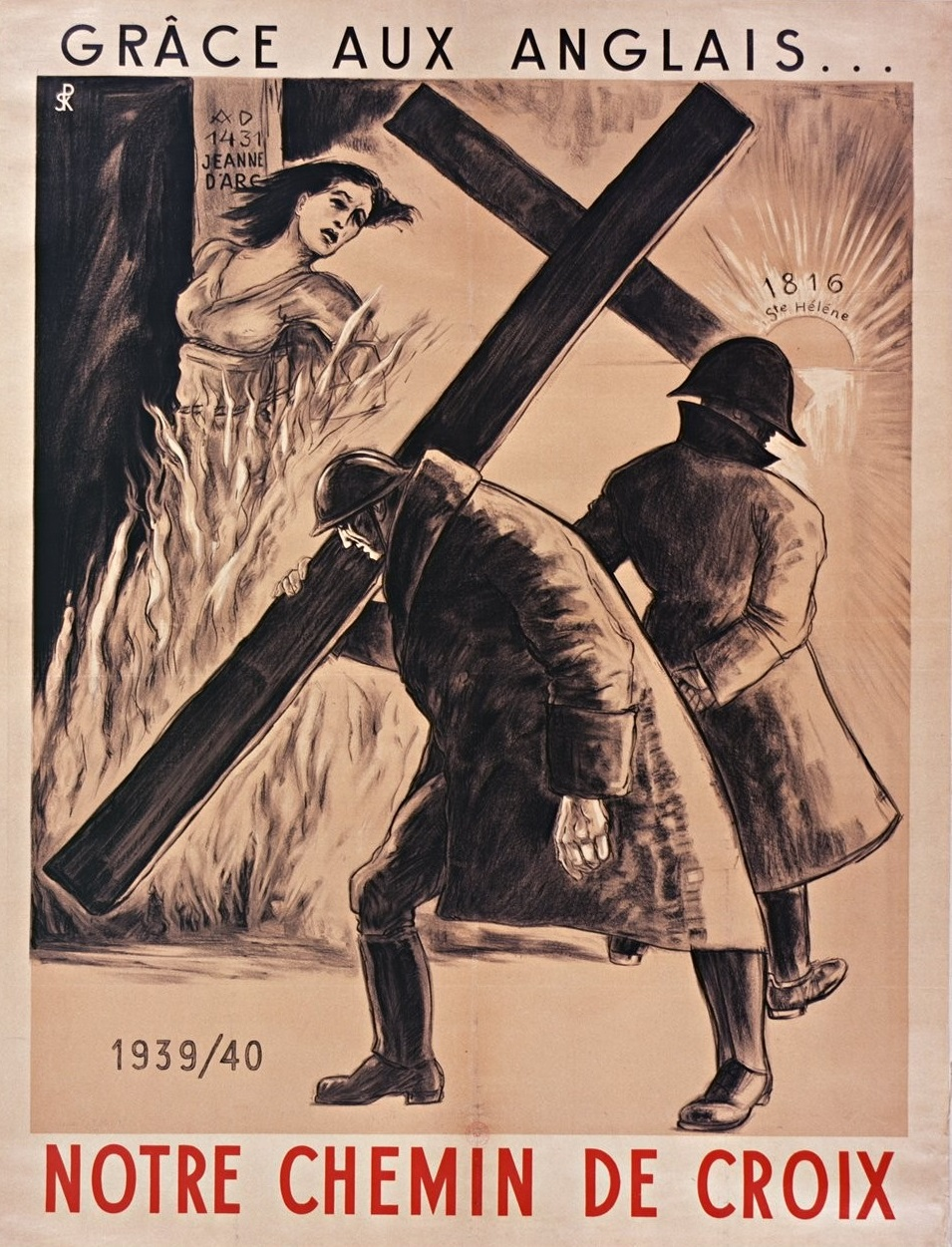 Affiche de propagande anti-britannique : « Grâce aux Anglais... notre chemin de croix », 1940.